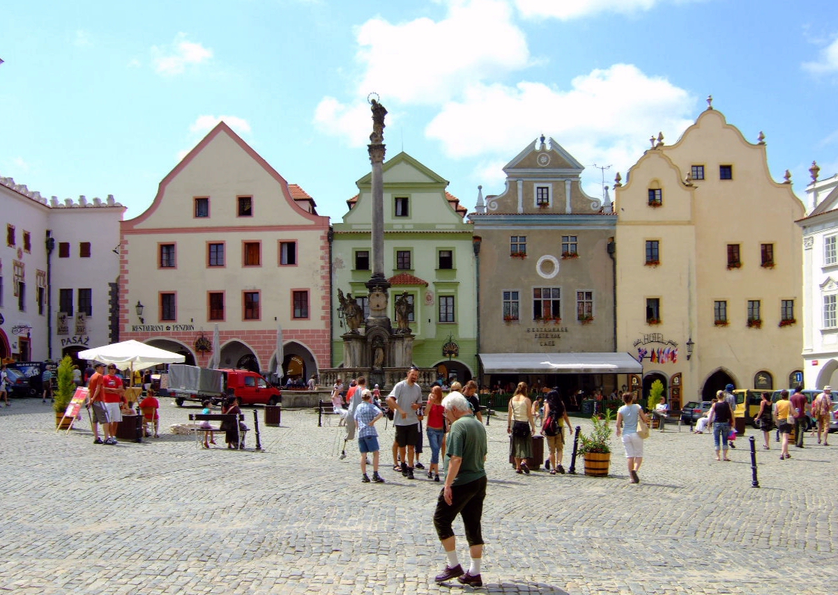 Český Krumlov: Marktplatz Aufnahme: 10. Juli 2006 Url